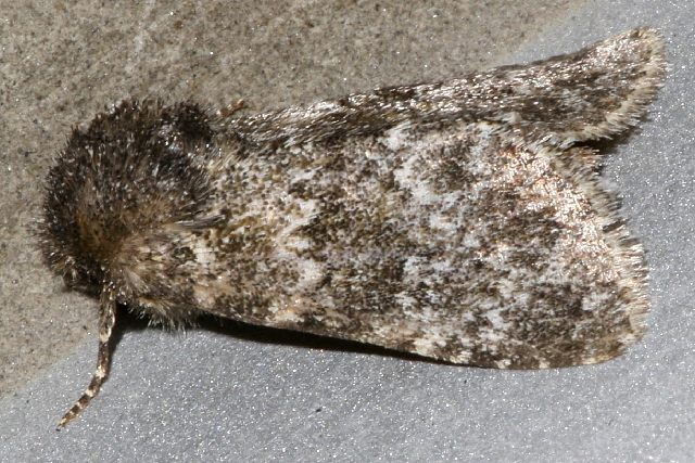 Pseudobryomima muscosa, Pemberton, British Columbia, Canada